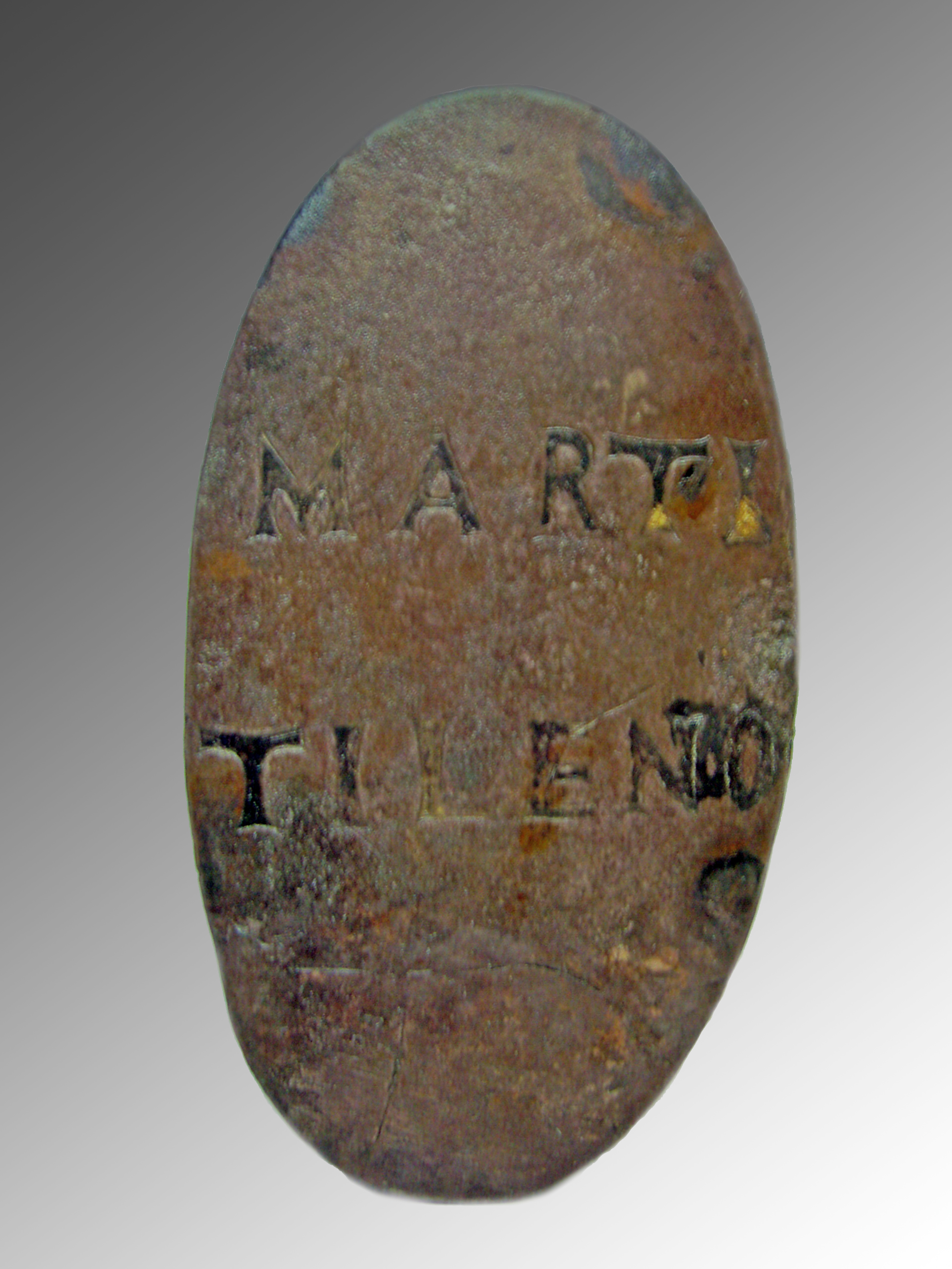 Marte Tileno